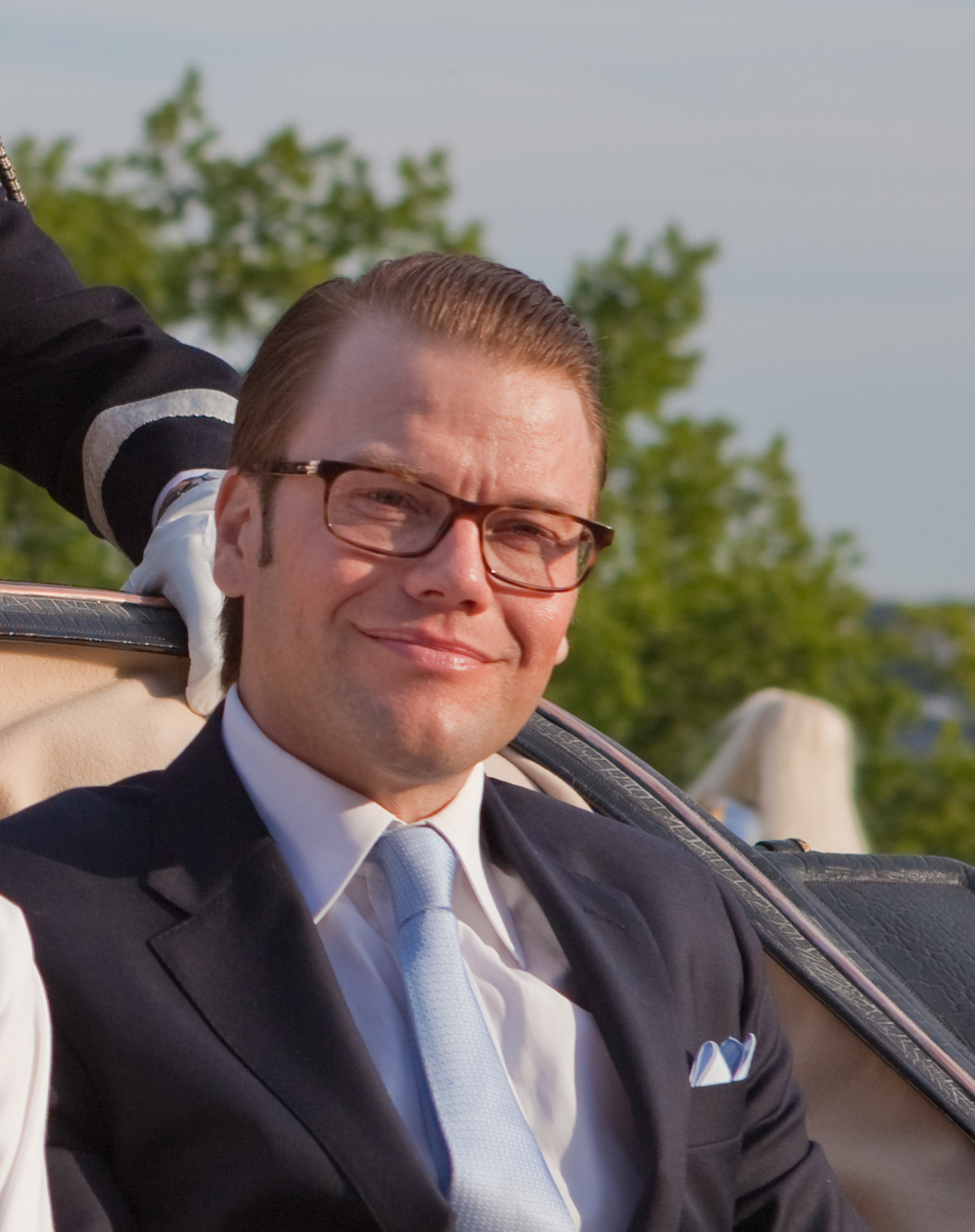 Daniel Westling.